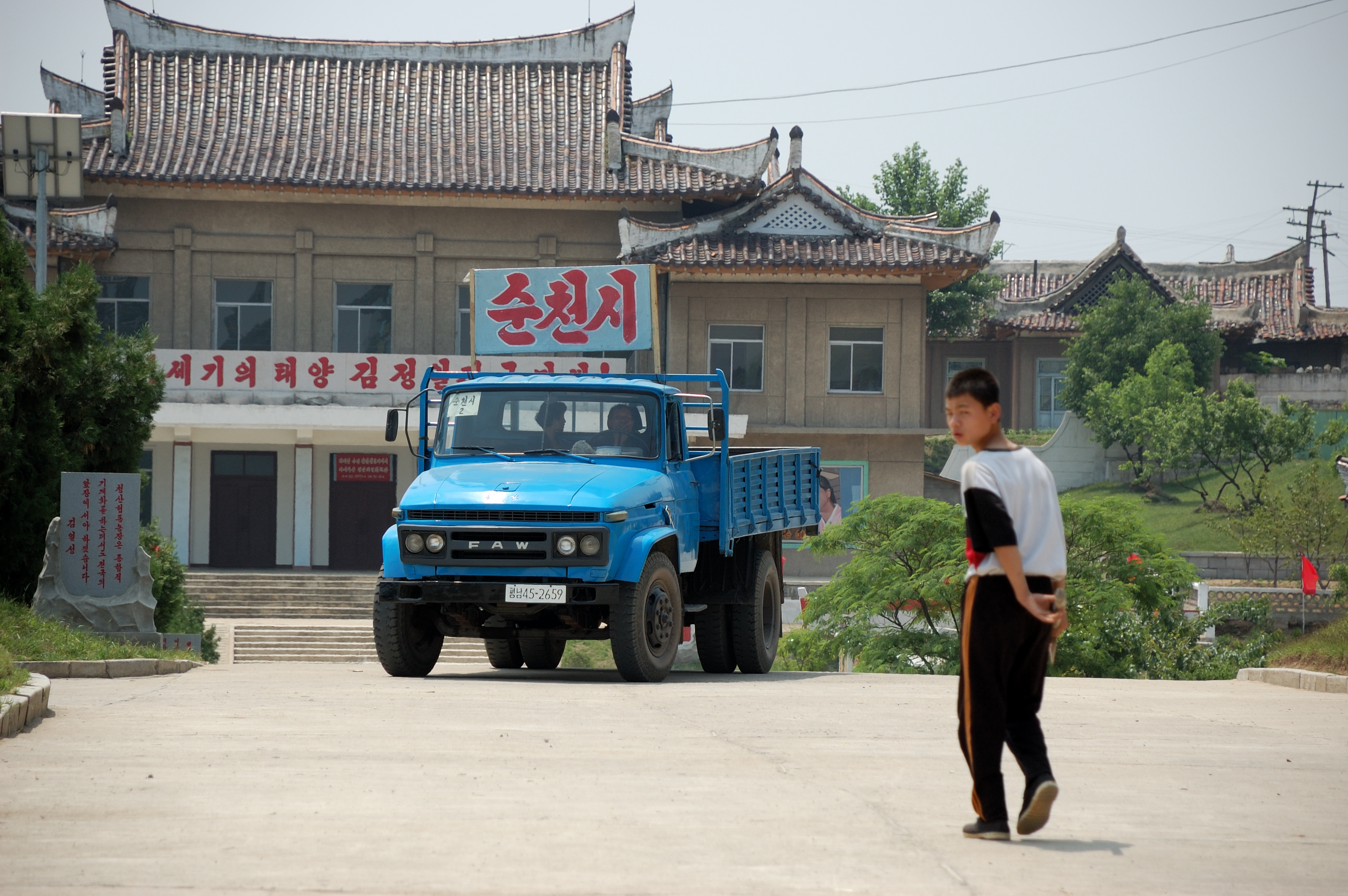 Chongsan-ri Farm, Kangso.